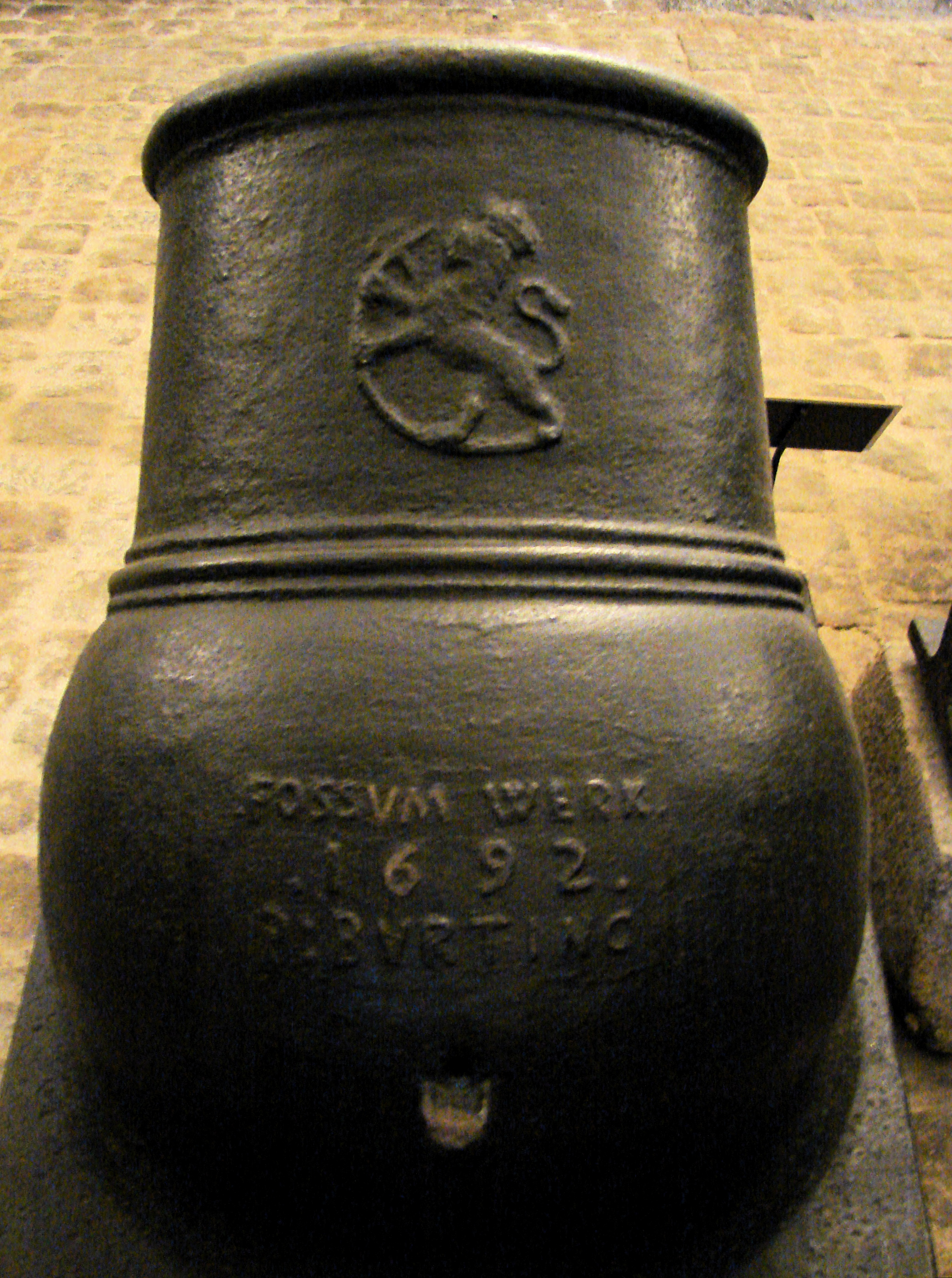 Mortér med Den Norske Løve og inskriptionen FOSSVM WERK 1692, P. Bvrting, Tøjhusmuseet, København